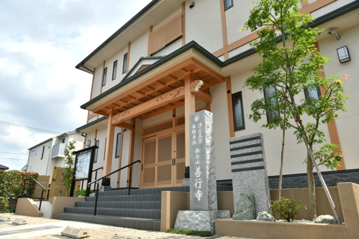 善行寺本堂外観